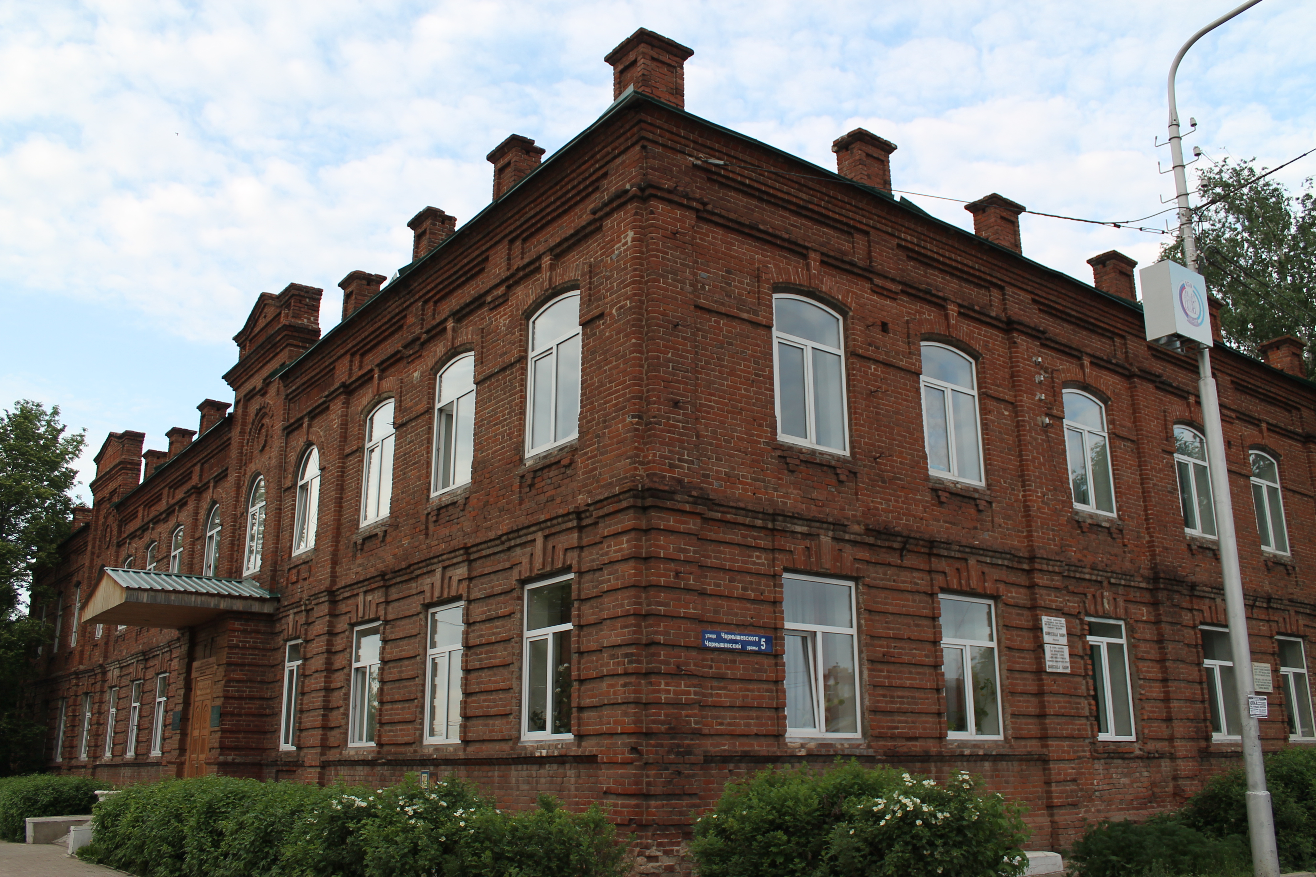 Здание медресе 'галия' (Республика Башкортостан, Уфа, чернышевского улица, 5)